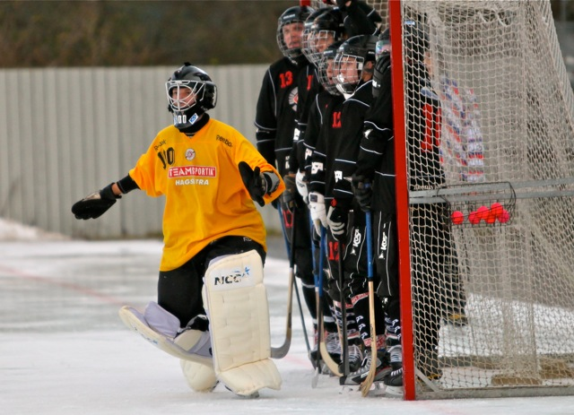 Bandymatchen Helenelunds IK-Norrtelje BF (3-5) på Sollentunavallen i herrarnas Division 1 östra, 26 december 2012. Foto: Bengt Jörnåker